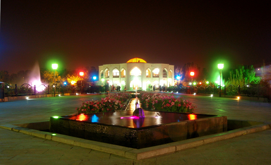 Shah-Goli, Tabriz, Iran